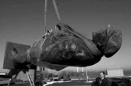 Die Lenin-Statue wird 2003 für eine Restaurierung zurück nach Eisleben transportiert.